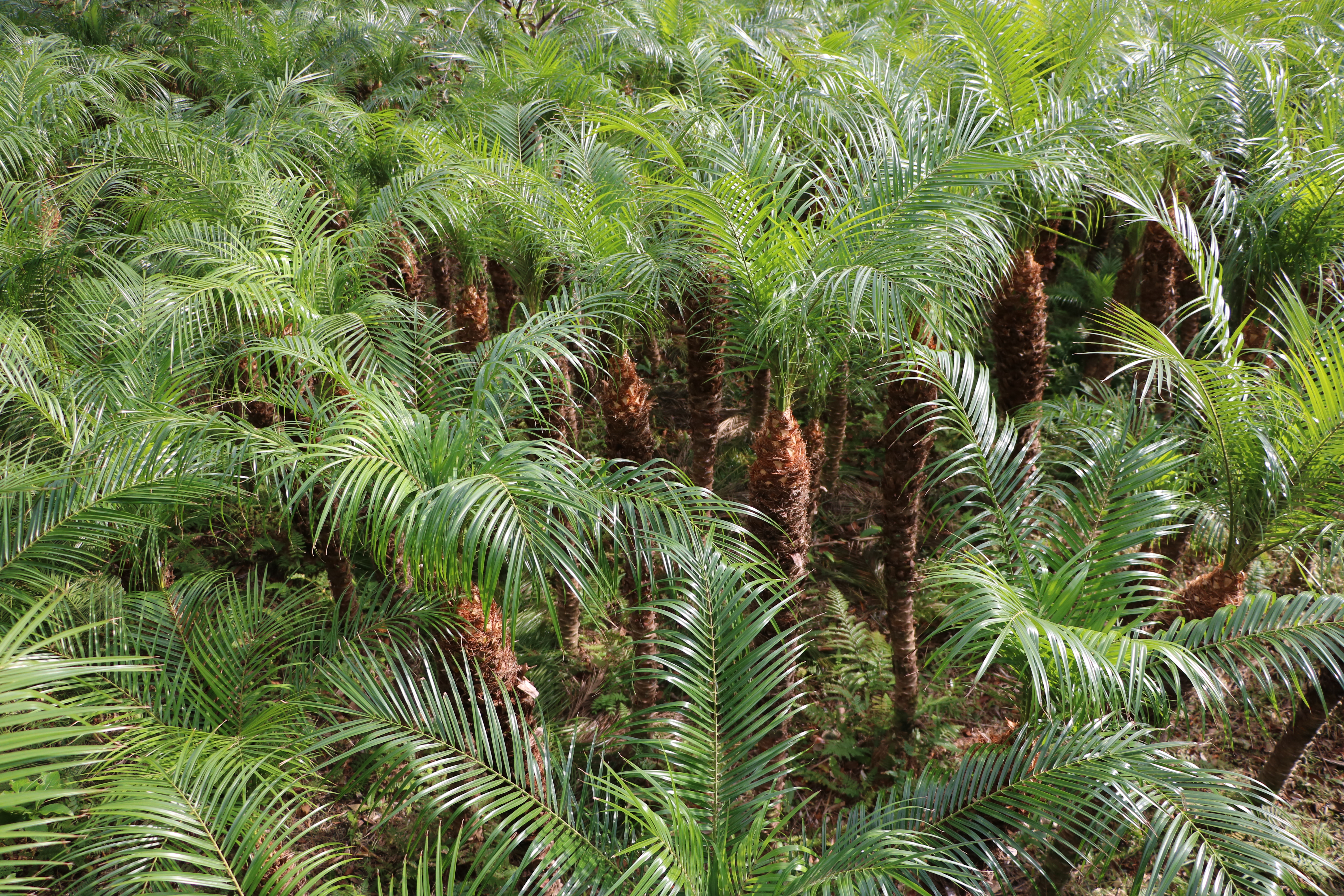 八丈島（東京都八丈町）のロべ（シンノウヤシ）露地栽培。